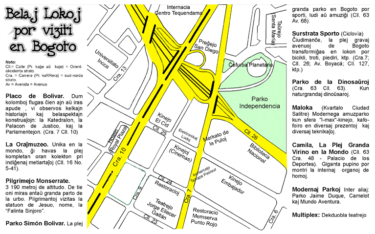 Faldfolio GVIDILO por la 4 TAKE-99